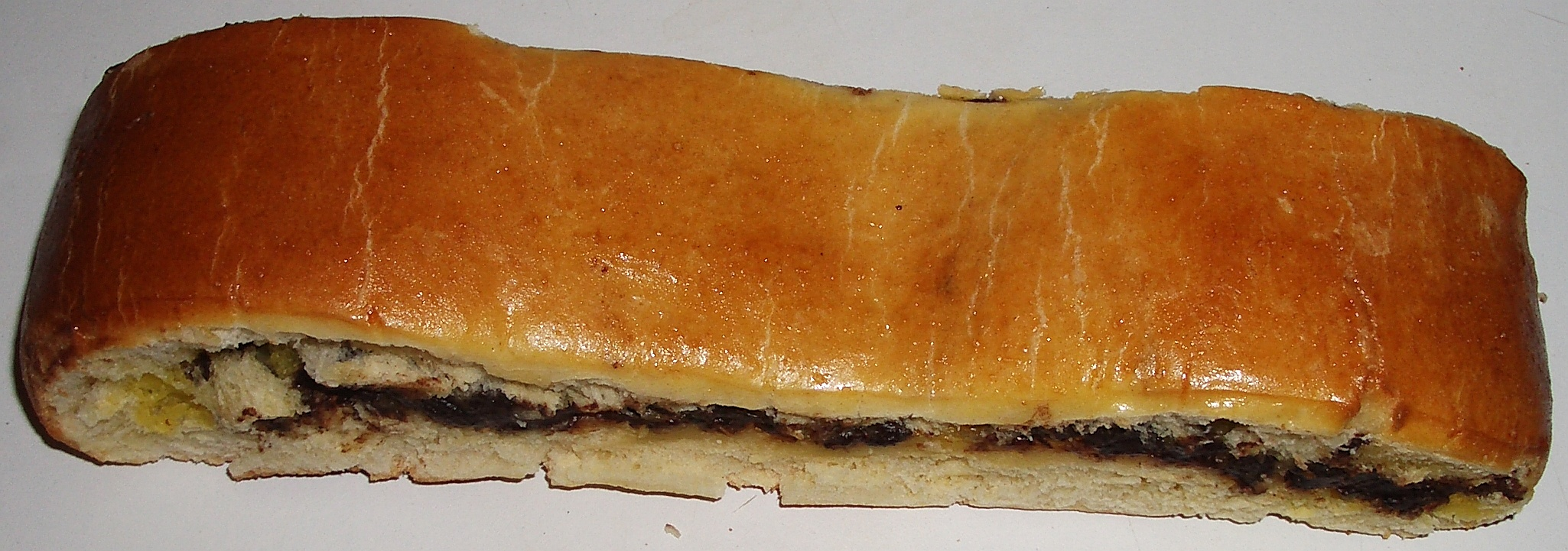 Une (choco) suisse achetée dans une boulangerie-pâtisserie Parisienne (19e ar)